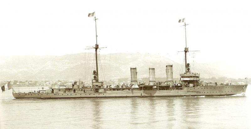 Der französische Kreuzer METZ ex SMS KÖNIGSBERG (II). A01311 METZ CROISEUR FRANCE 1928